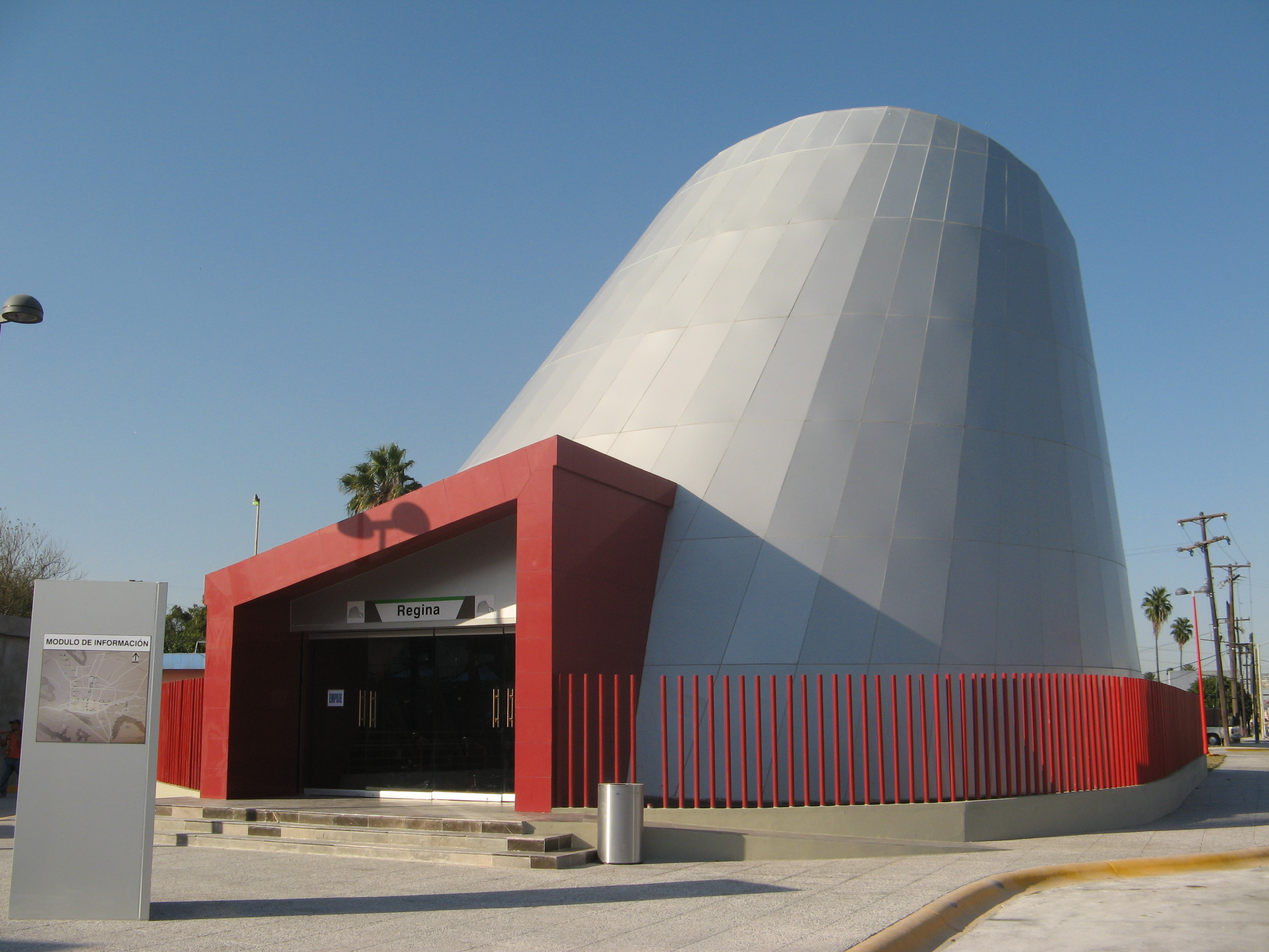 Regina Station entrance, Monterrey Metro, México.